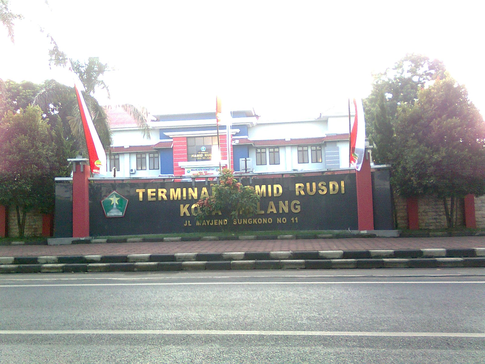 Ini adalah terminal Hamid Rusdi, Lowokwaru, Malang